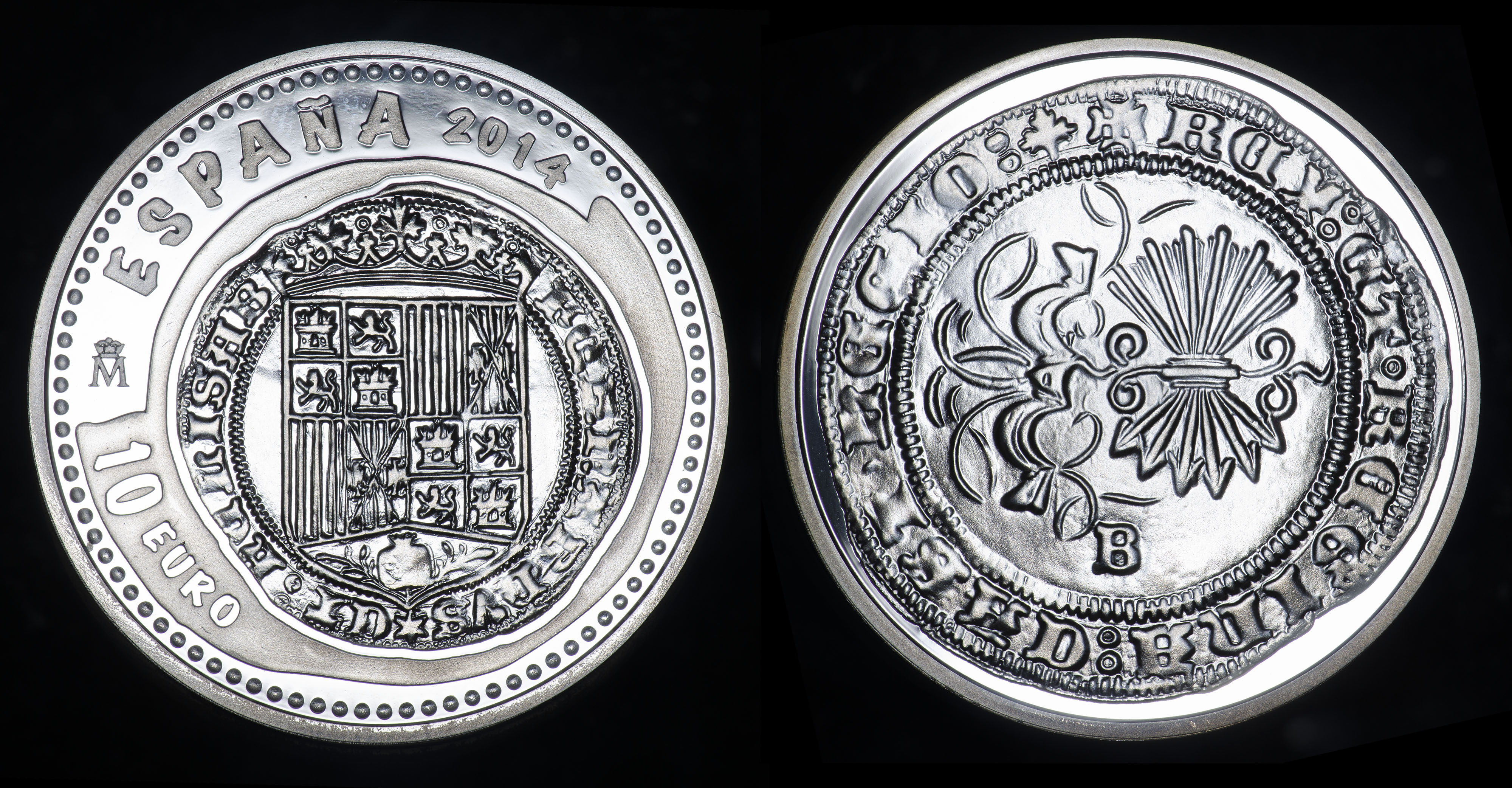 Moneda emitida para coleccionista de 10 euros de España de 2014. En ambos lados, dentro de un círculo, se reproducen un real de los Reyes Católicos. Plata de 925 milésimas y 40 mm de diámetro.